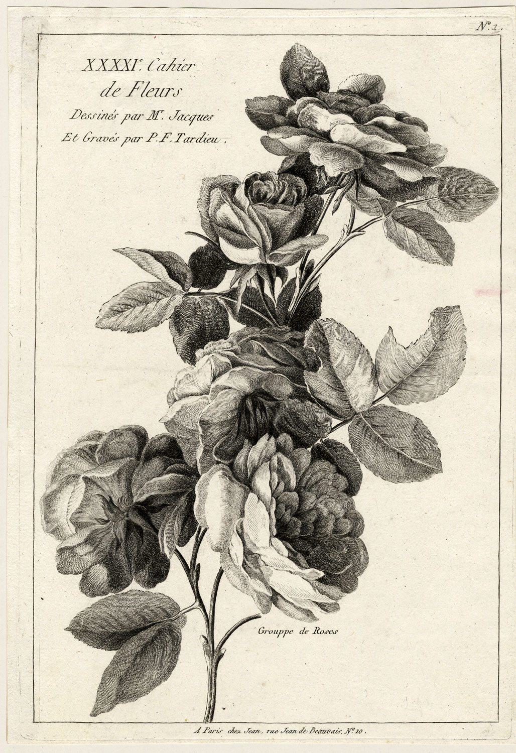 Grouppe de Roses (Aus: Nouveau Recueil de Fruits, Fleurs et Plantes utiles aux Dessinateurs), Kupferstich; Paris, 1749